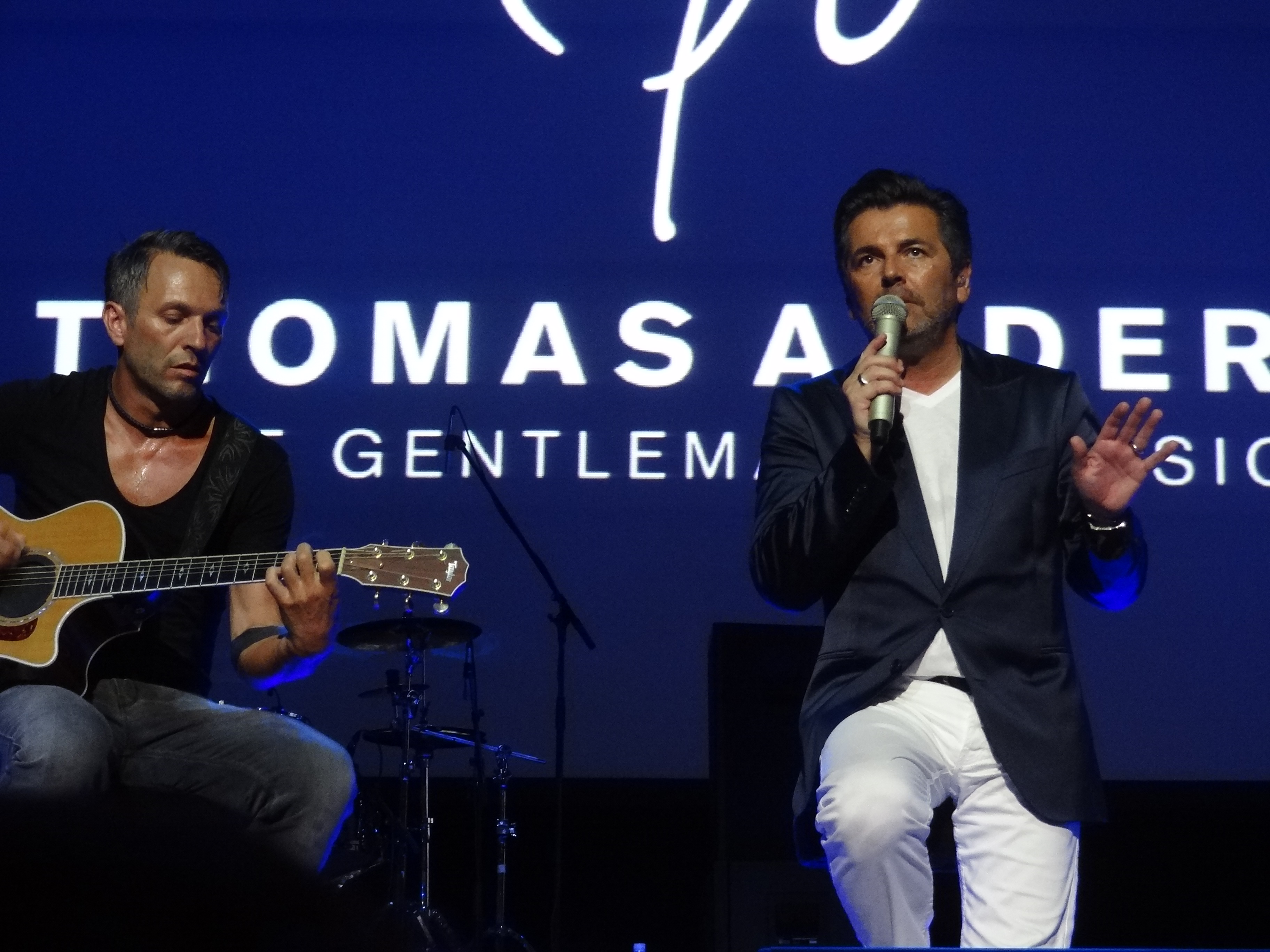 Томас Андерс в Сочи.